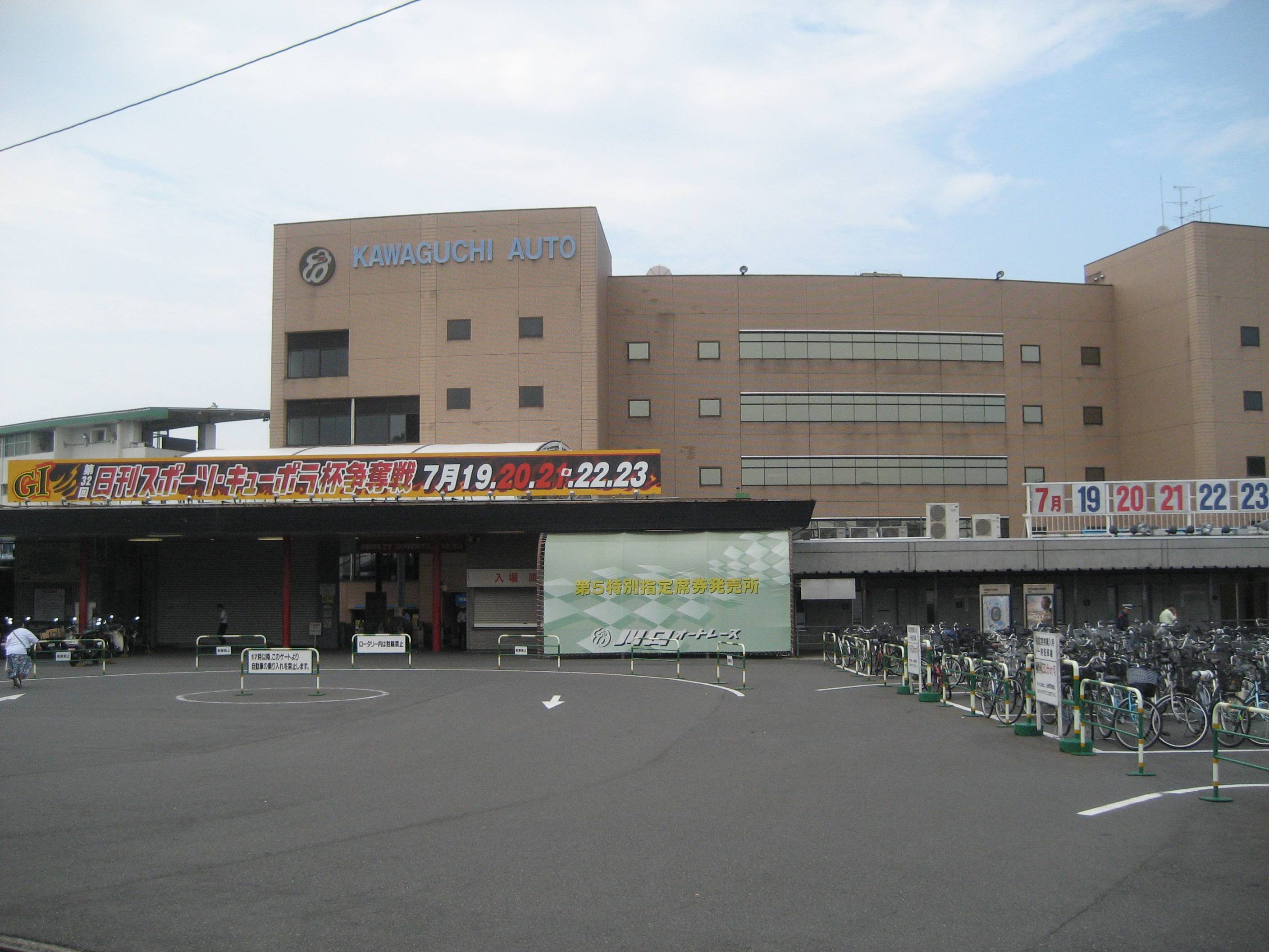 川口オートレース場正門